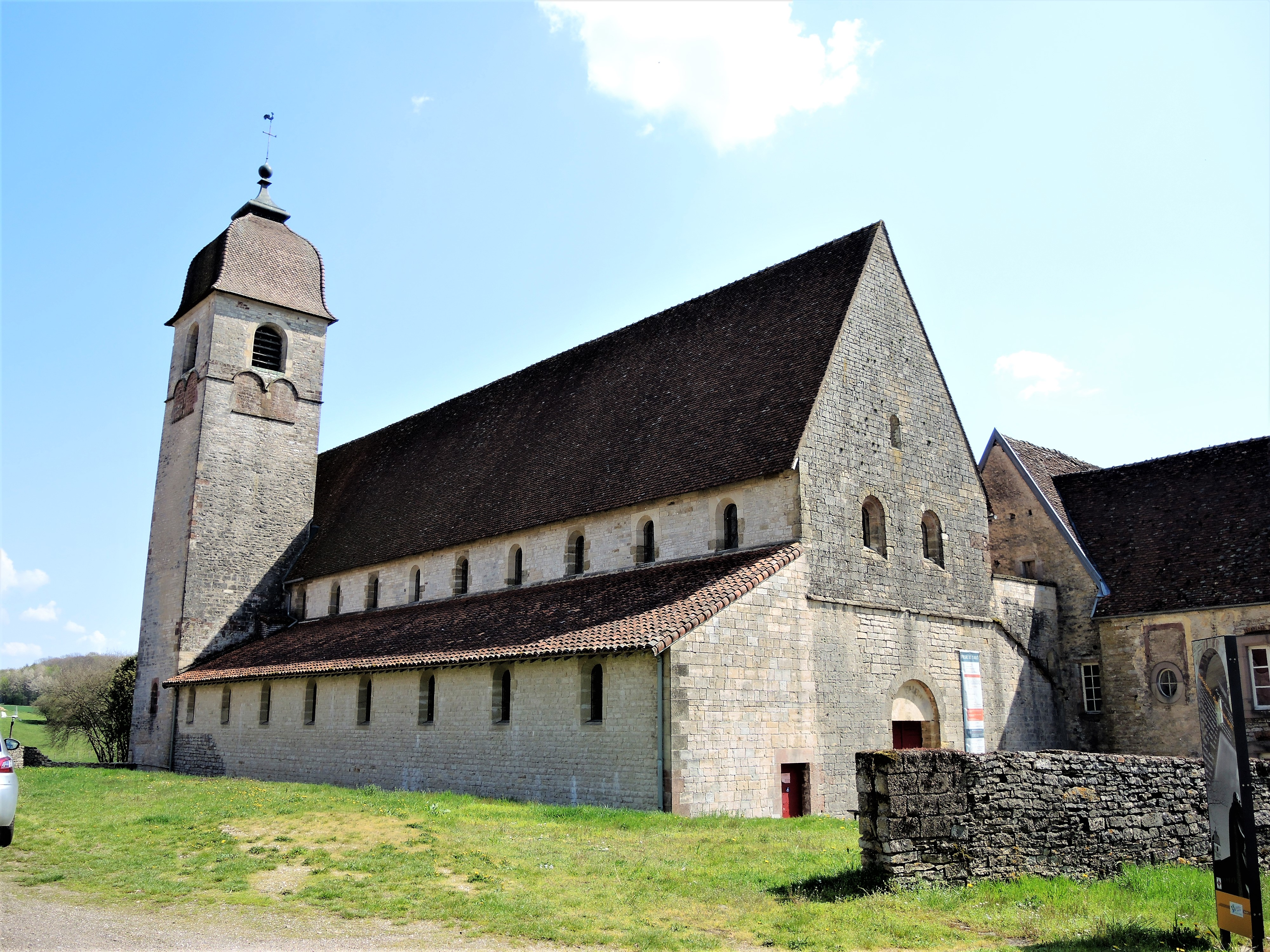 Eglise de Marast